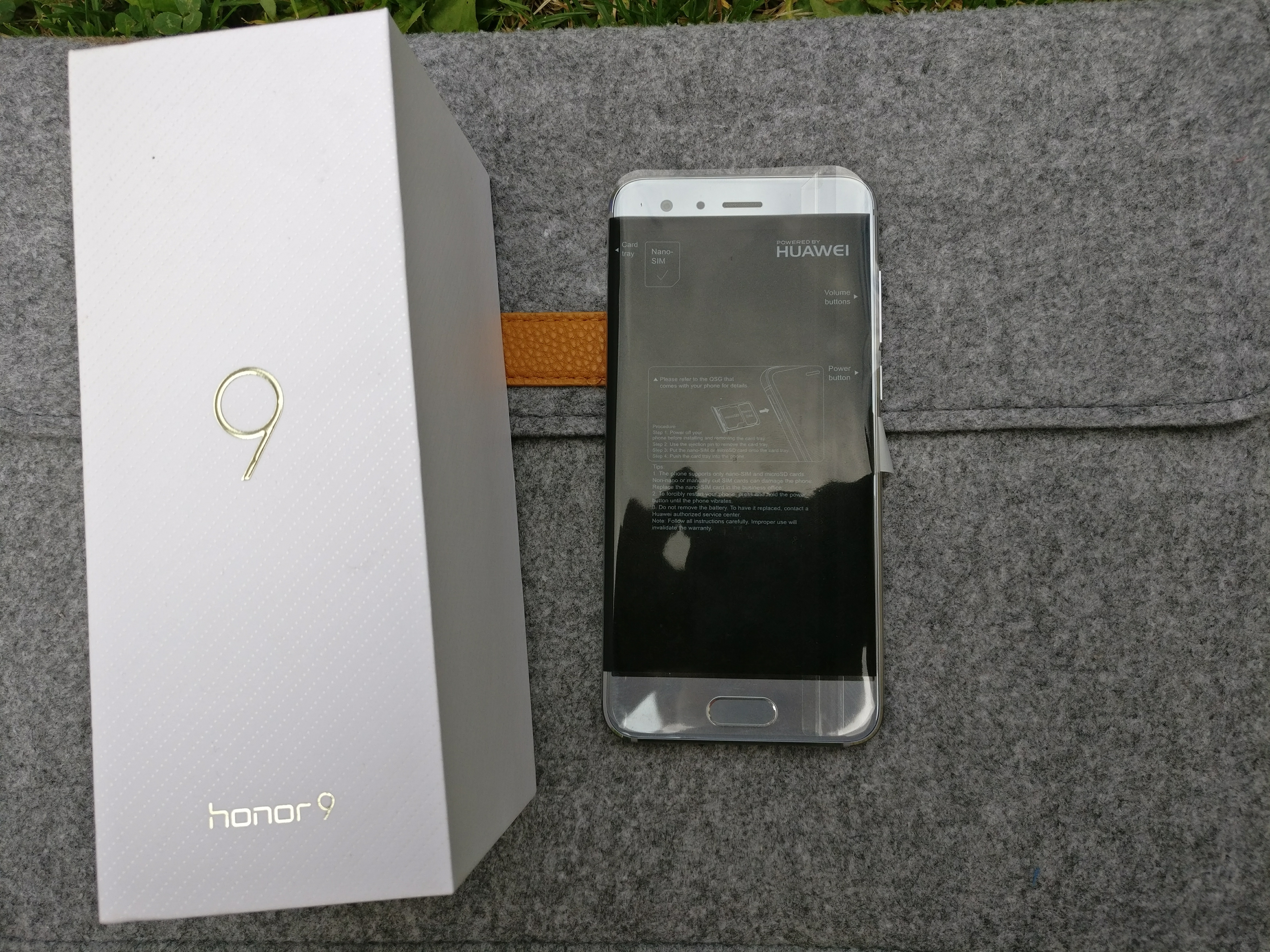 Huawei Honor 9 in silver